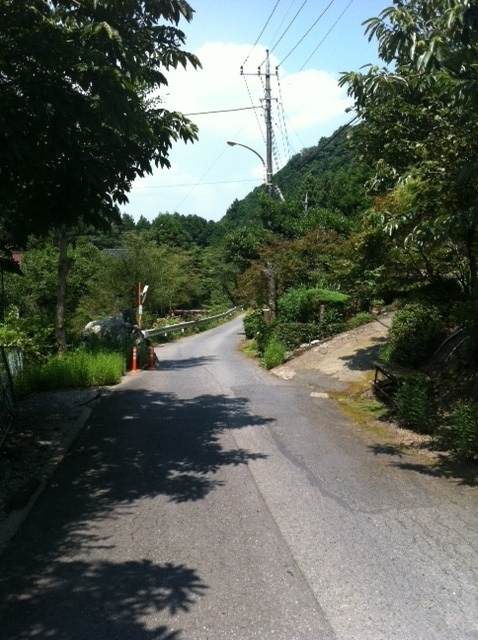 埼玉県道61号越生側の分断地点